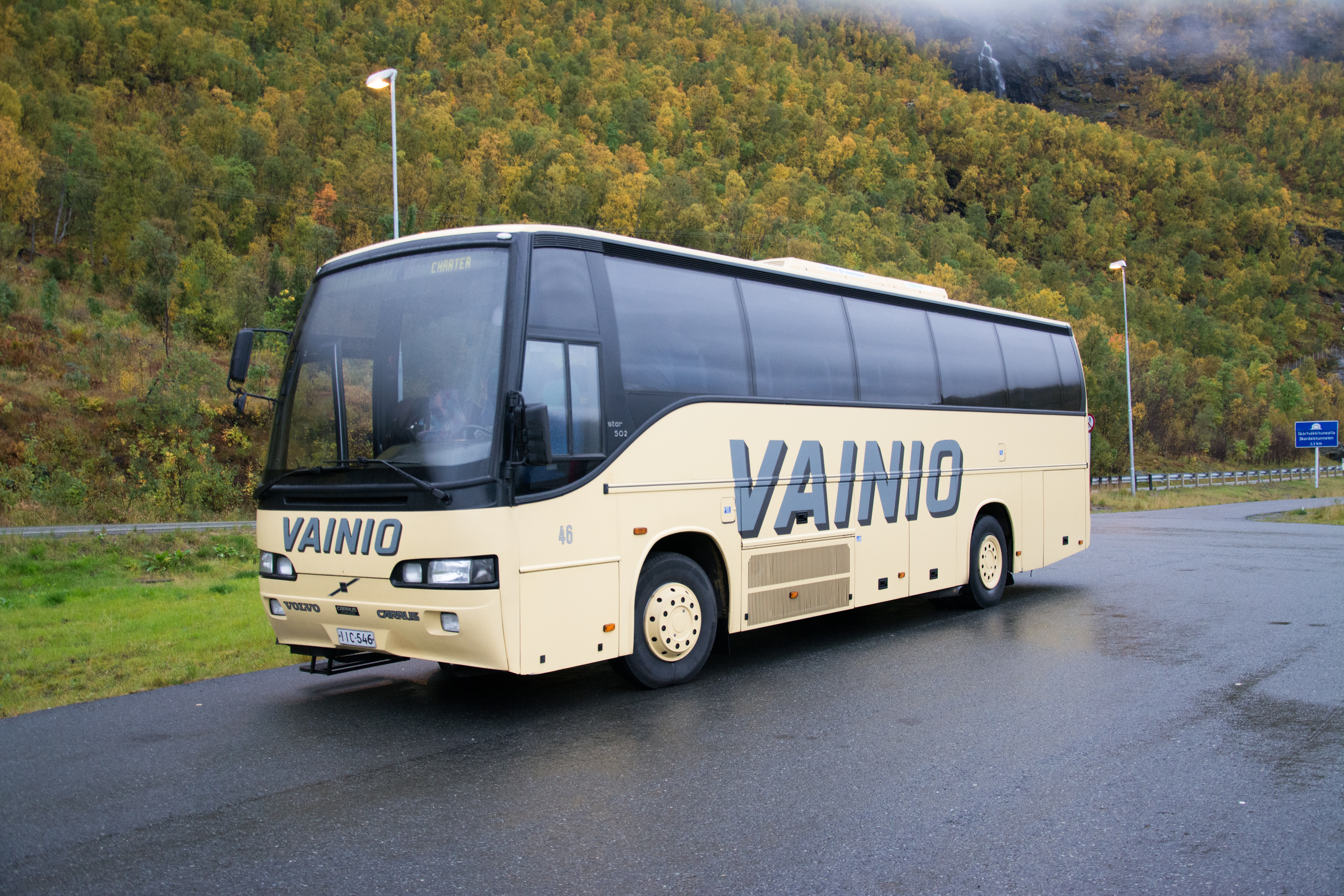 Volvo B10M linja-auto